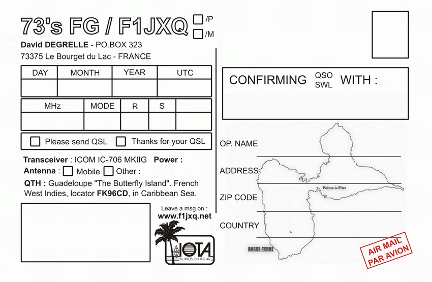 Dos d'une carte QSL, carte postale utilisé par les radio-amateurs pour confirmer un échange radio (QSO) longue distance (DX).